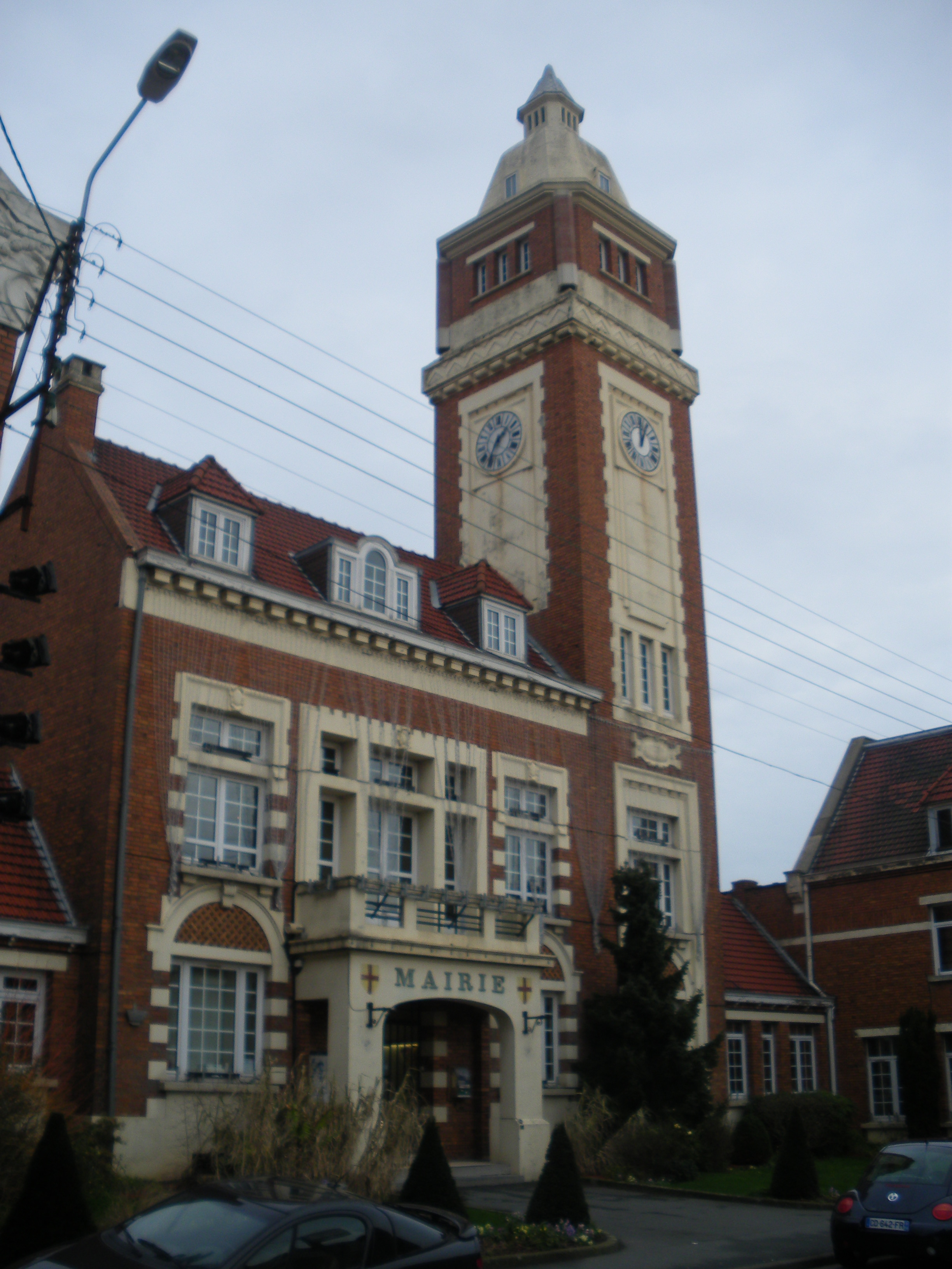 Vue de la mairie de Lesquin.